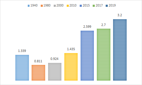 Graudu kopraža Latvijā pa atsevišķiem gadiem miljonos tonnu